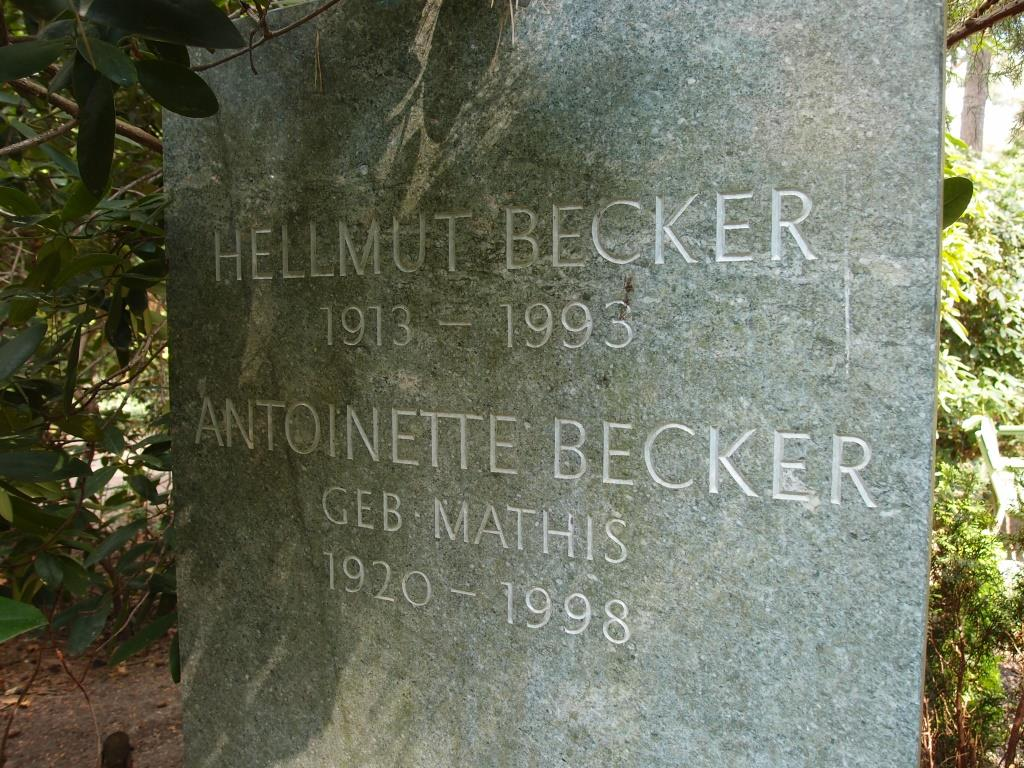 Grab des Juristen, Bildungsforschers und Bildungspolitikers Hellmut Becker (1913-1993) auf dem Waldfriedhof Dahlem in Berlin